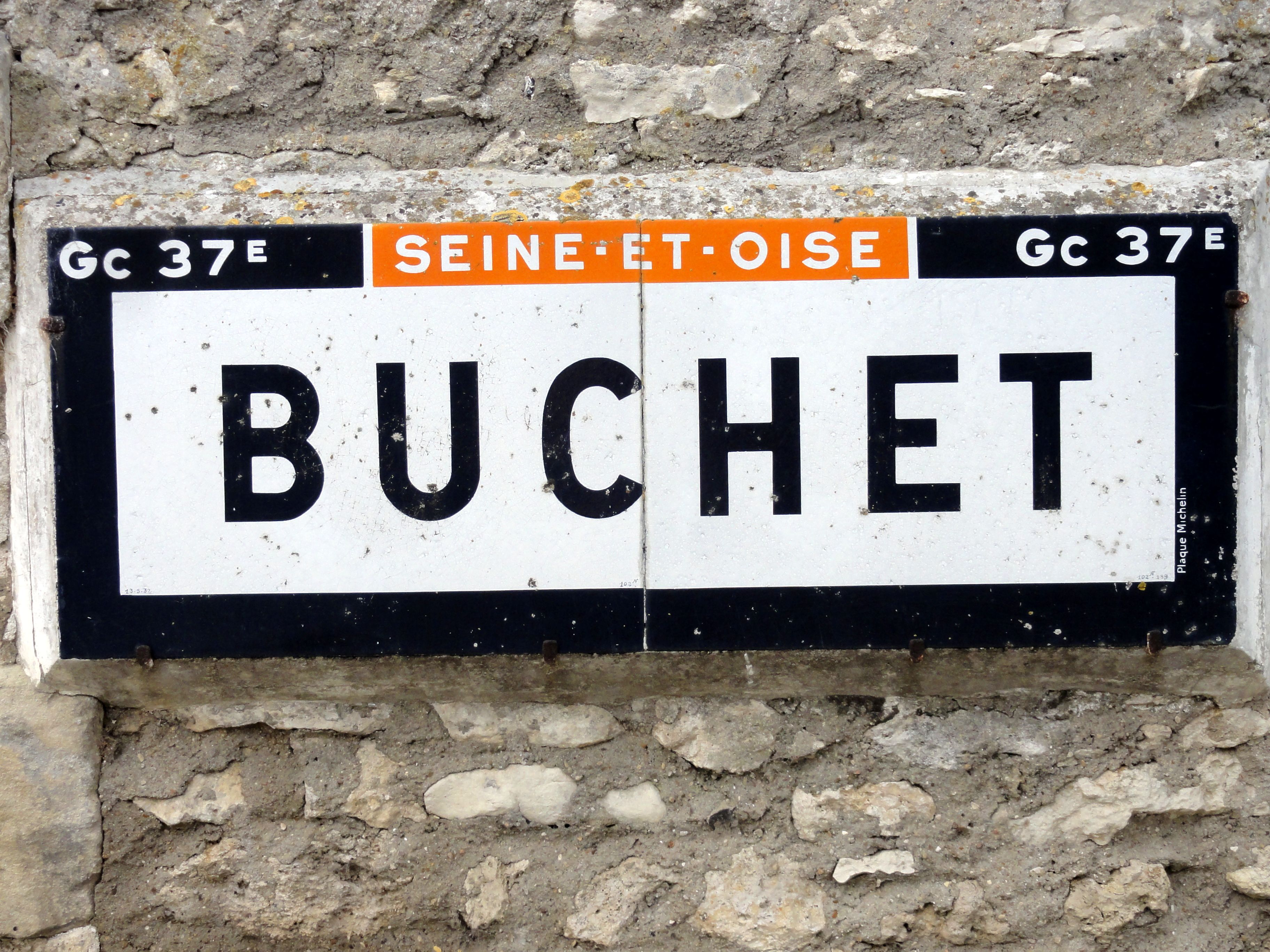 Plaque Michelin de 1932 au hameau de Buchet.